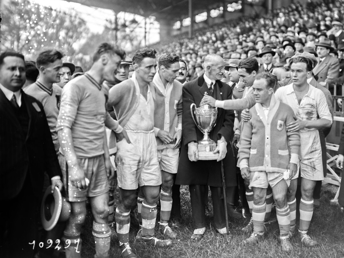 Photo prise à Colombes le 9 mai 1926, journée durant laquelle l'Olympique de Marseille reçoit sa deuxième Coupe de France.